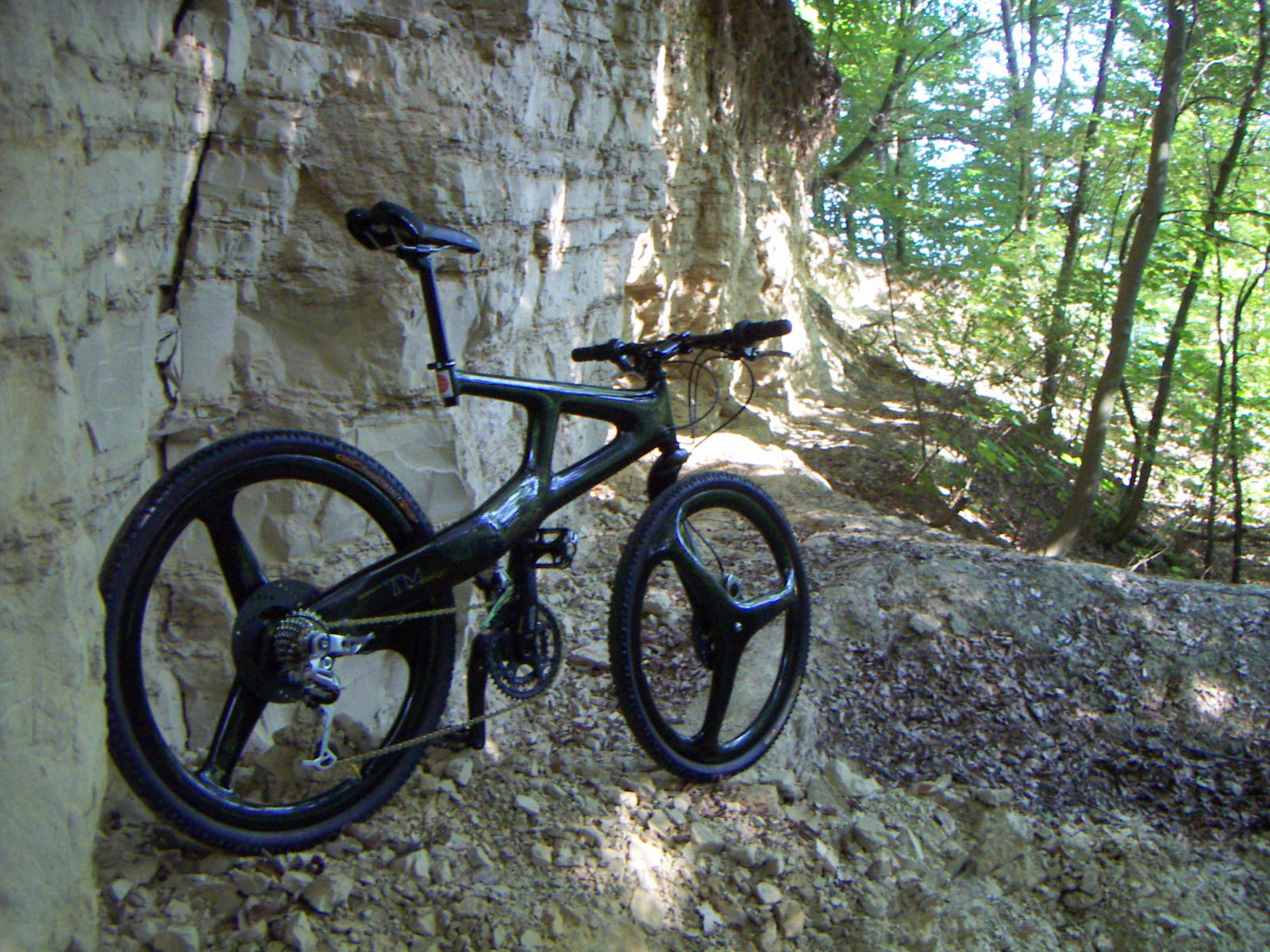 Fahrradtechnik